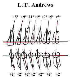 Andrews Zahnangulationen (Kieferorthopädie)